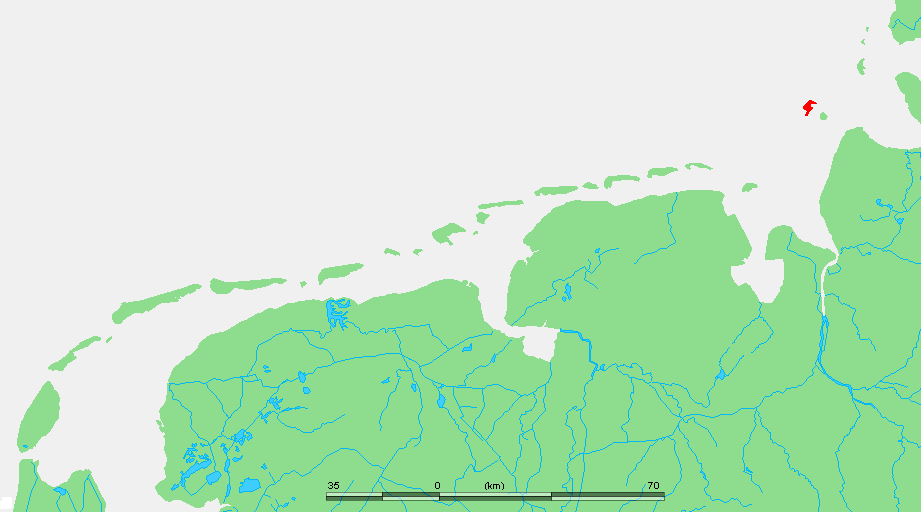 Wadden - Scharhörn